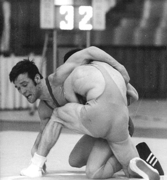 Klaus-Peter Göpfert ADN-ZB Kluge 18.4.74 Zella-Mehlis: Mit fünf Titeln war Dynamo Luckenwalde bei den DDR-Meisterschaften im klassischen Ringkampf am Wochenende in Zella-Mehlis am erfolgreichsten. Drei mal siegten die Gastgeber, aus deren Reihen mit Klaus-Peter Goepfert auch der beste Techniker kam. Klaus-Peter Goepfert bei einem früheren Wettkampf.